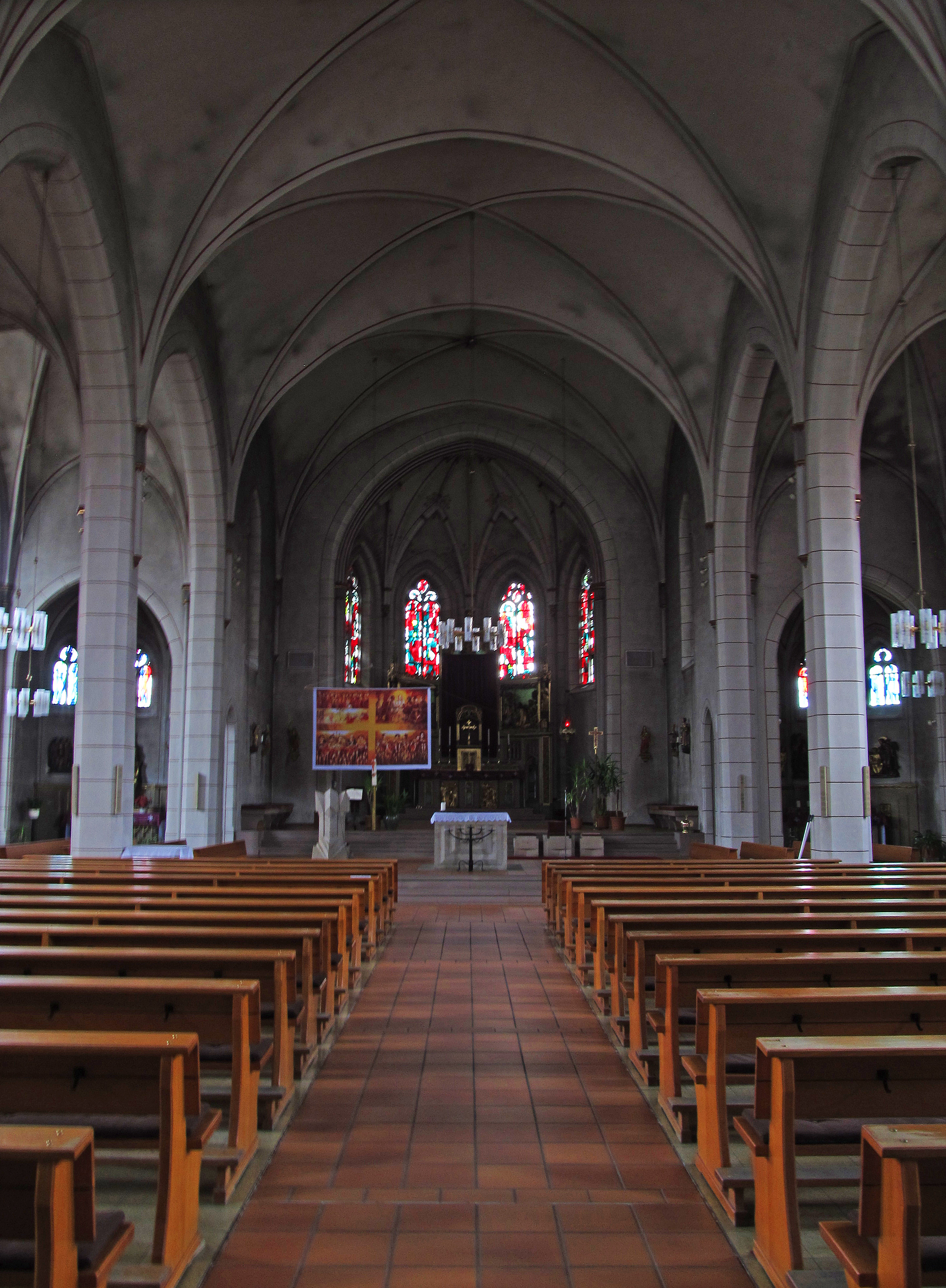 Blick ins Innere der katholischen Pfarrkirche St. Bartholomäus in Schwarzenholz, einem Ortsteil der Gemeinde Saarwellingen, Landkreis Saarlouis, Saarland